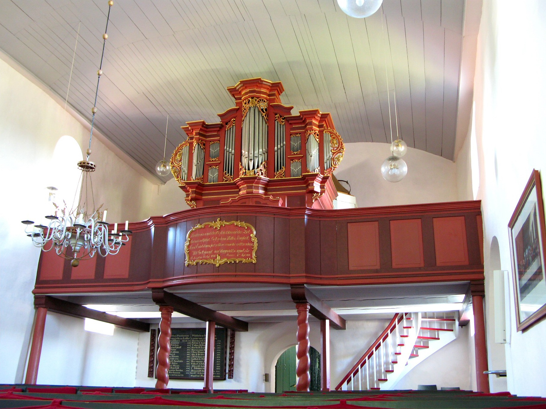 Orgel in Middels, Landkreis Aurich